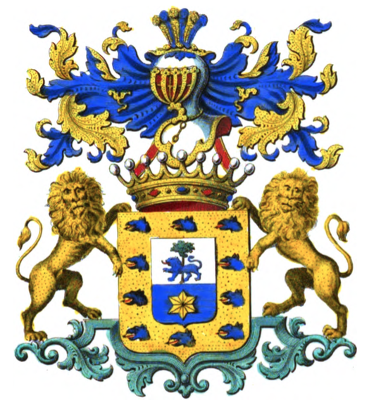 Armoiries de la famille d'Alcantara